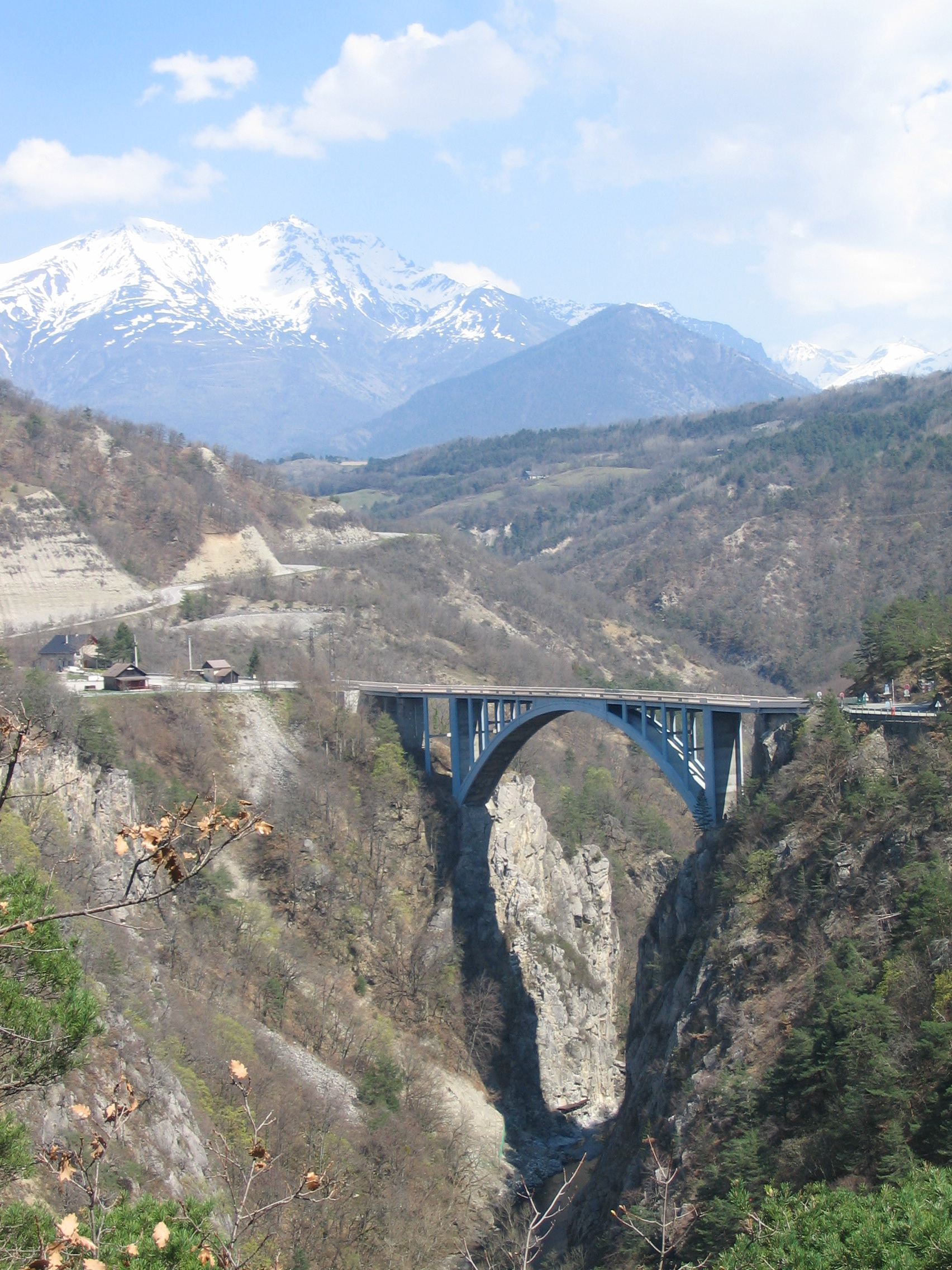 Autre vue pont de Ponsonnas (Isère).